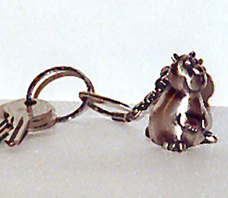 Mein Teddy-Schlüsselanhänger aus Silber von der Schmuckdesignerin Astrid Stenzel, Berlin. Erstellt nach einer Vorlage von Comiczeichner Ralf König.